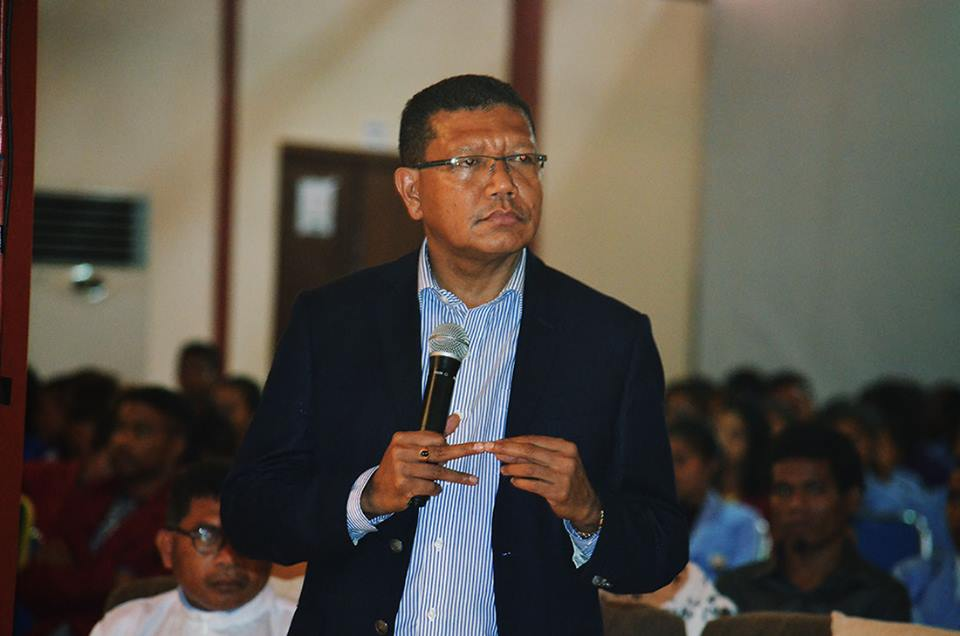 Hélder da Costa aus Osttimor, Generalsekretär der g7+-Staaten